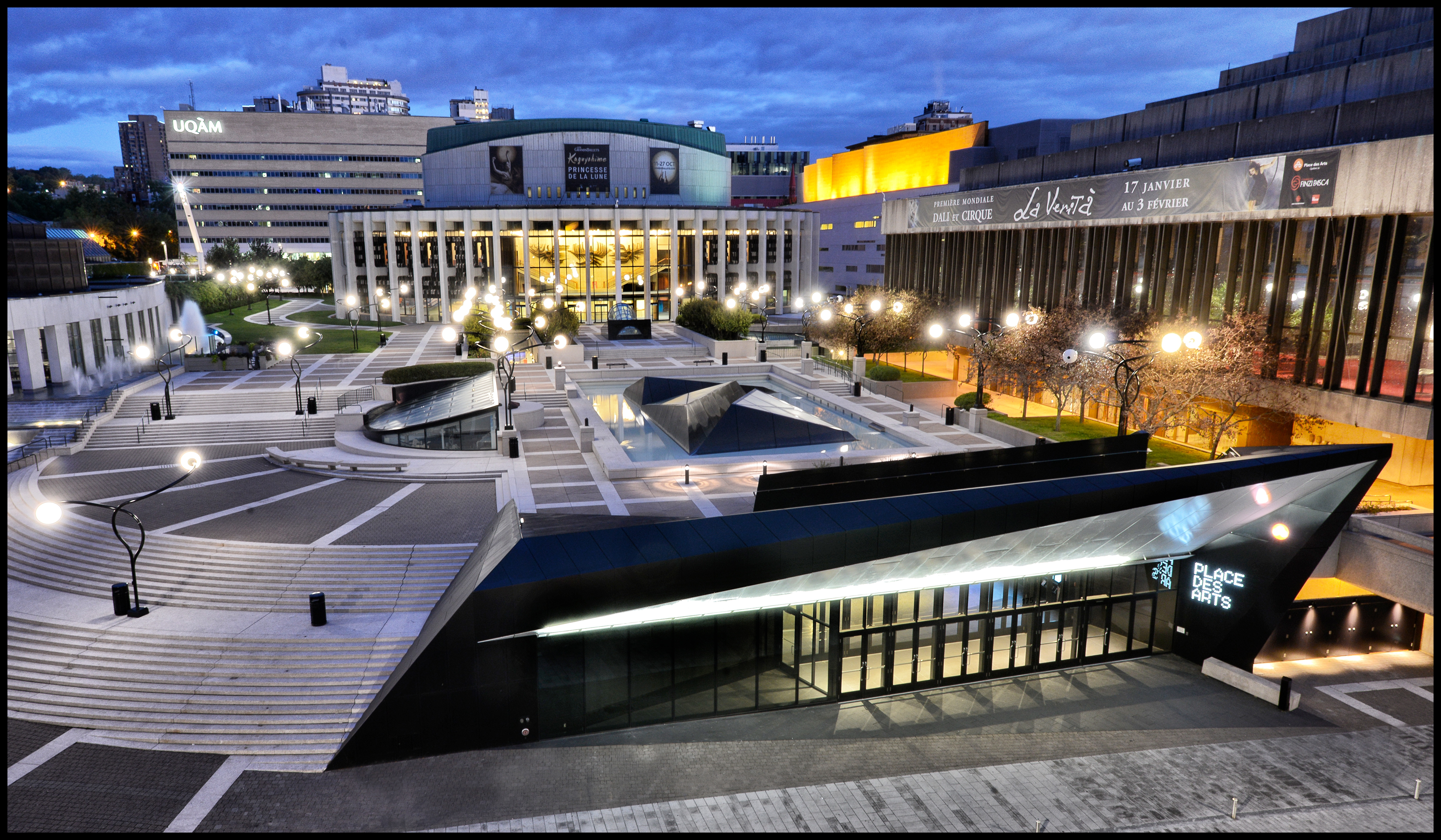 Marquise de la Place des Arts